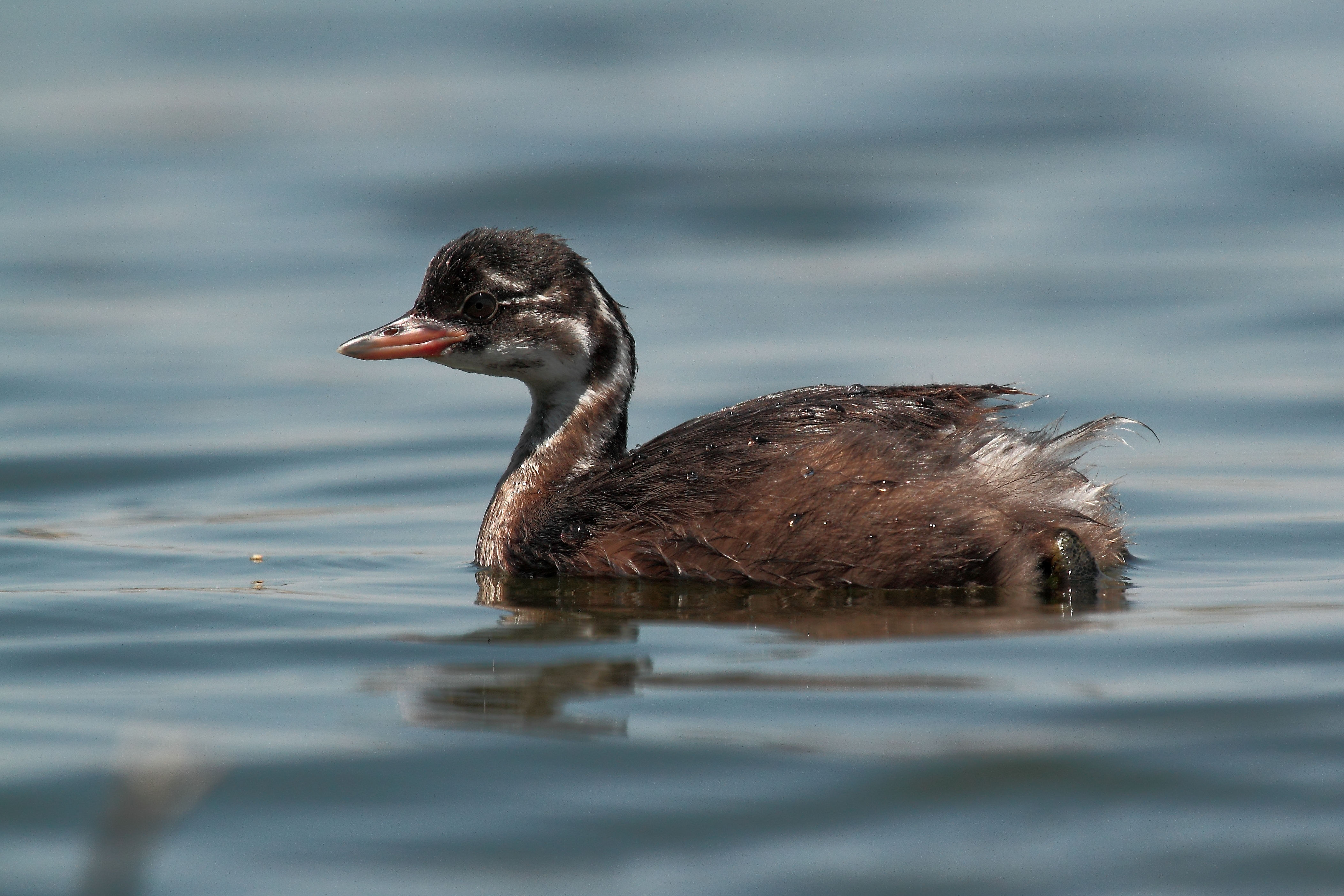 Zampullín chico, joven Tachybaptus ruficollis